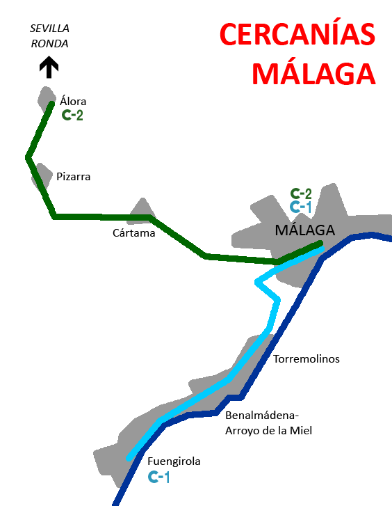 Plano de Cercanías Málaga